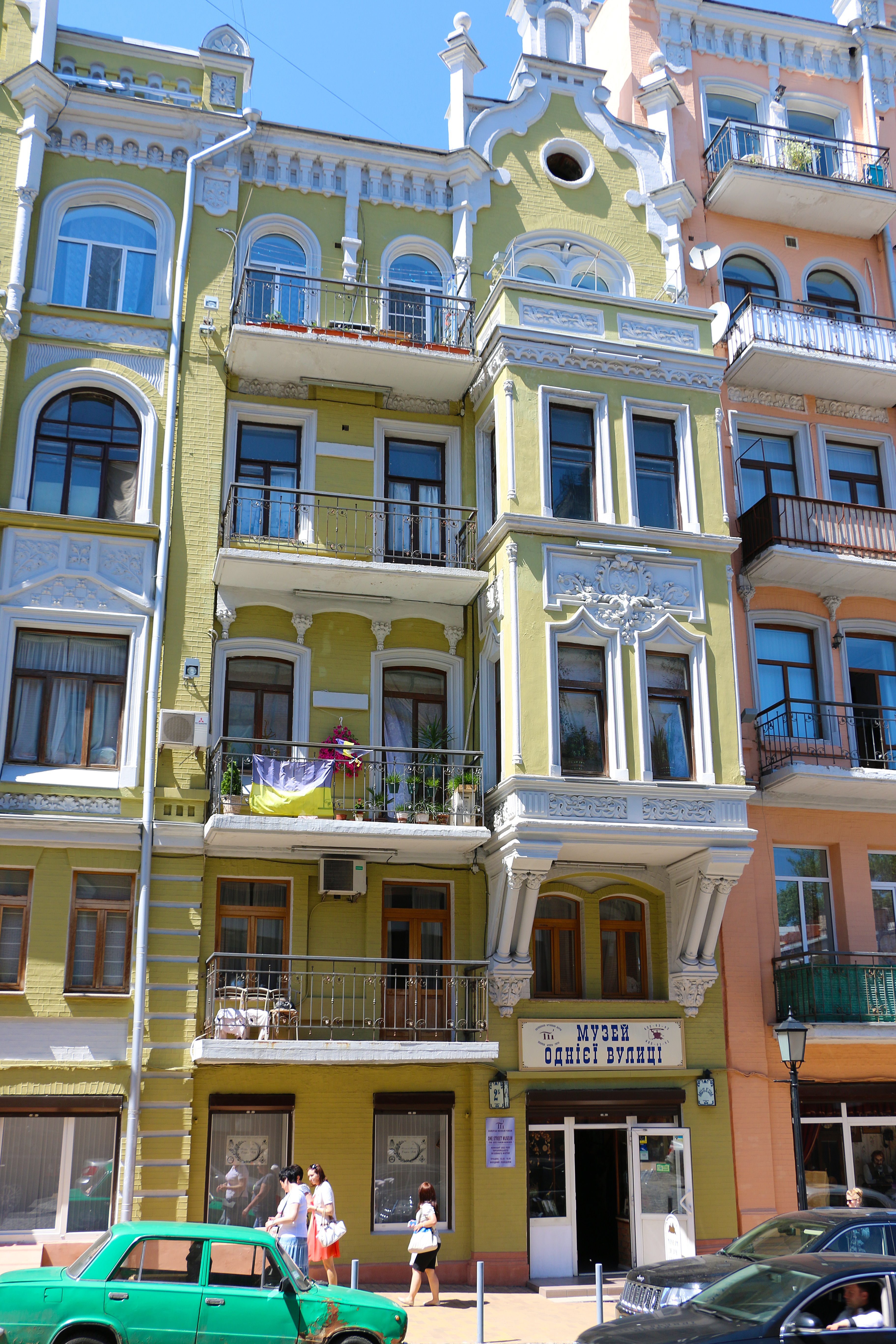 Будинок прибутковий, Київ, Андріївський узвіз, 2б